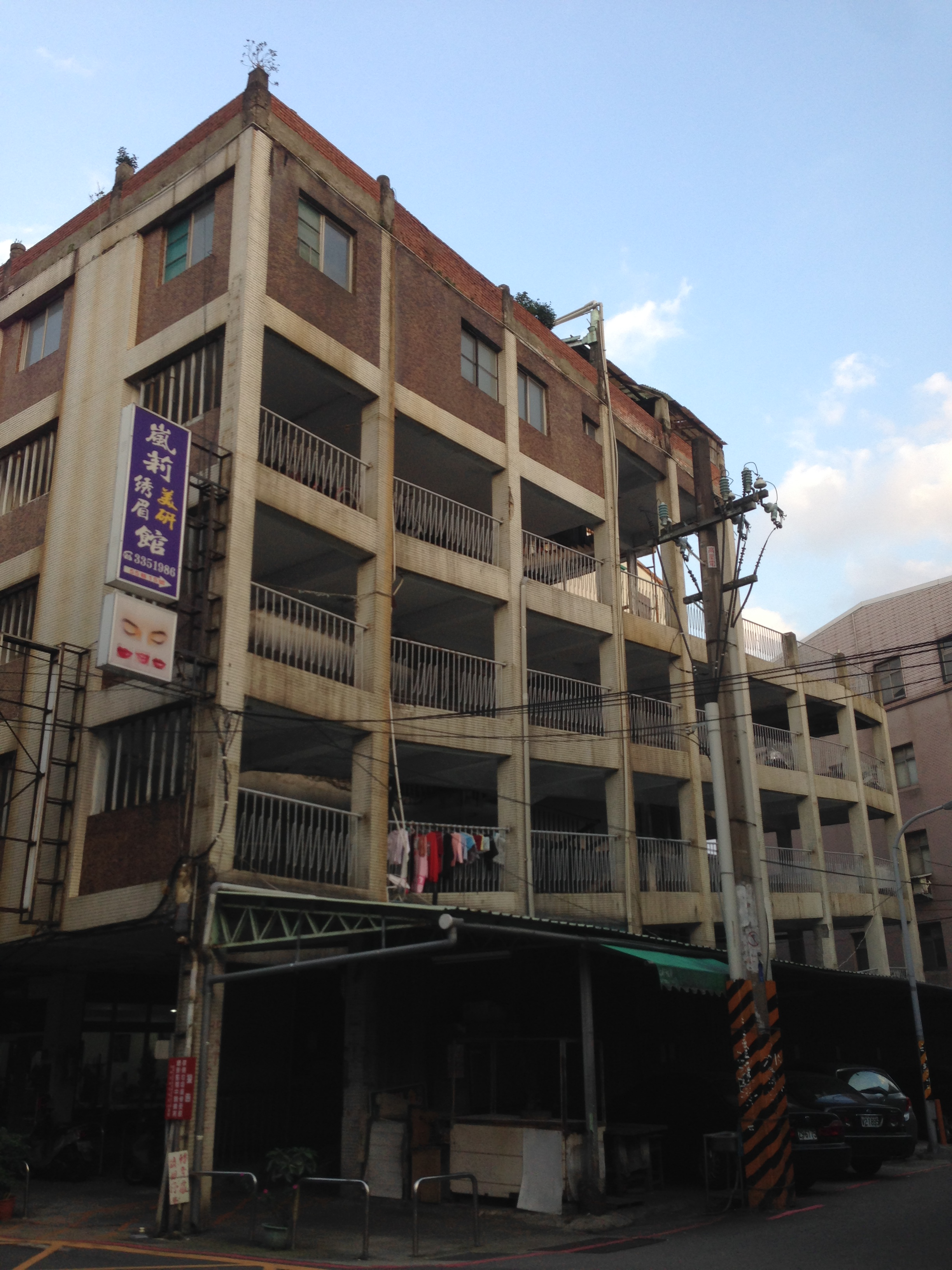 中文（台灣）: 桃園市桃園區秀山路57巷公寓